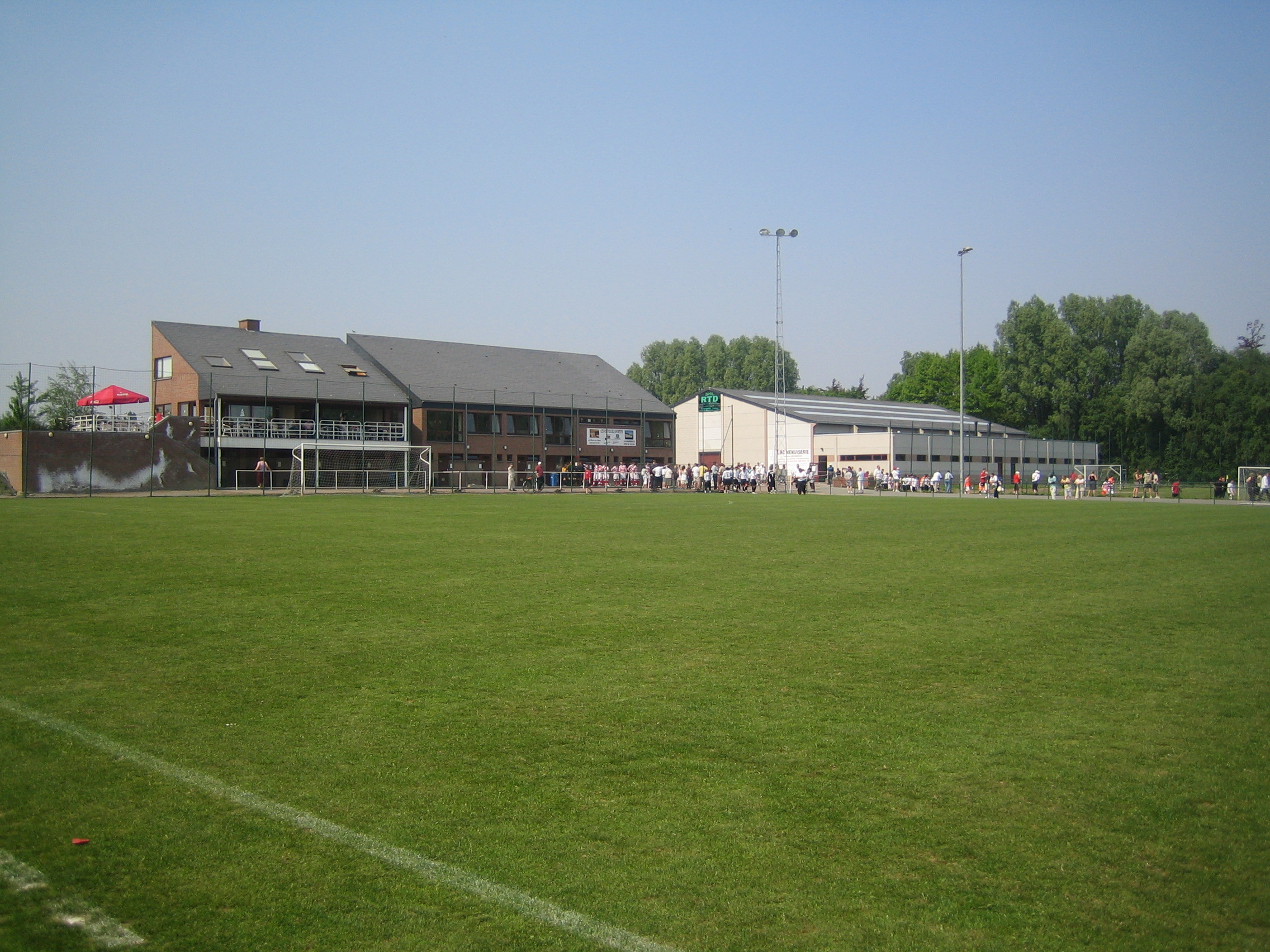 L'ensemble des bâtiments du Futurosport avec au fond à droite le terrain synthétique intérieur